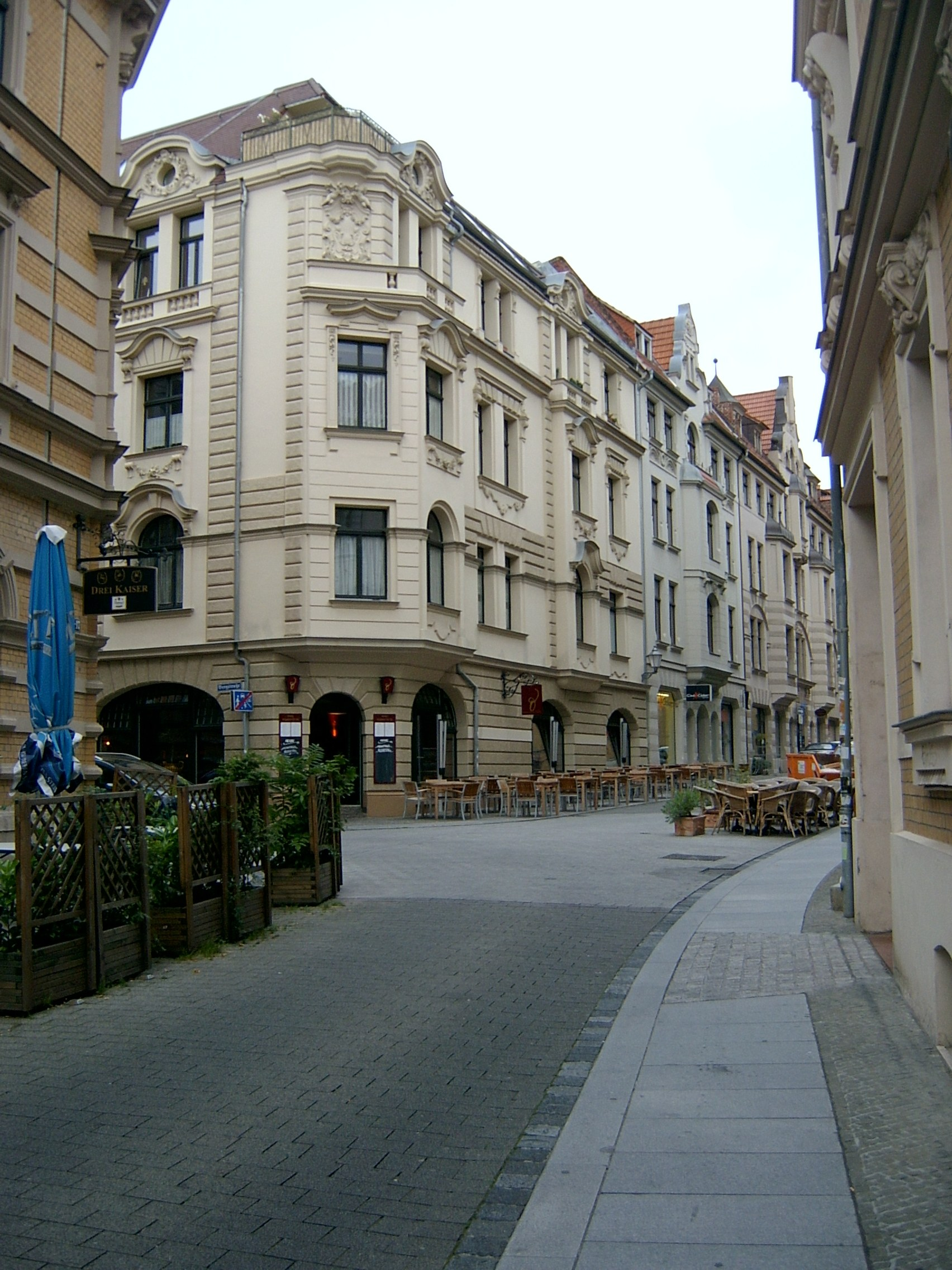 Die Kleine Ulrichstraße in Halle (Saale), Blick von der Einmündung zur Jägergasse Richtung Norden